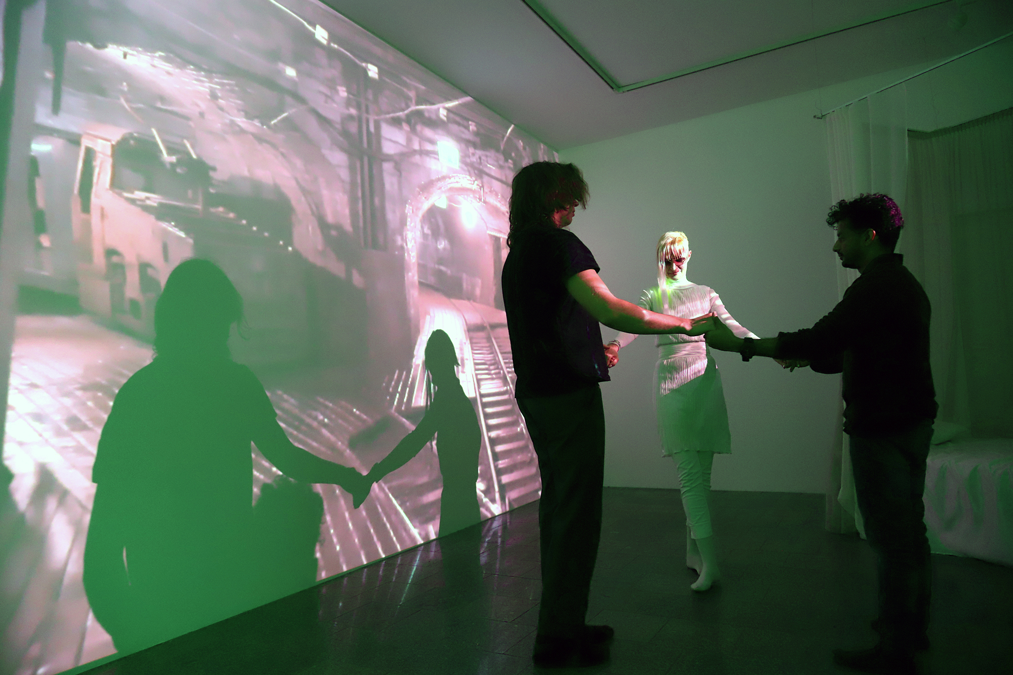 Meeli Kõiva performance Vabaduse galeriis 26.02.20 (05)